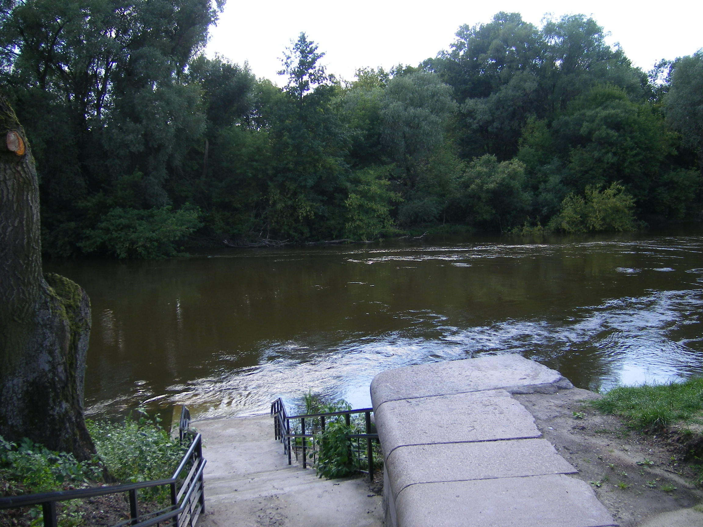 Western Bug river in Brest Fortress